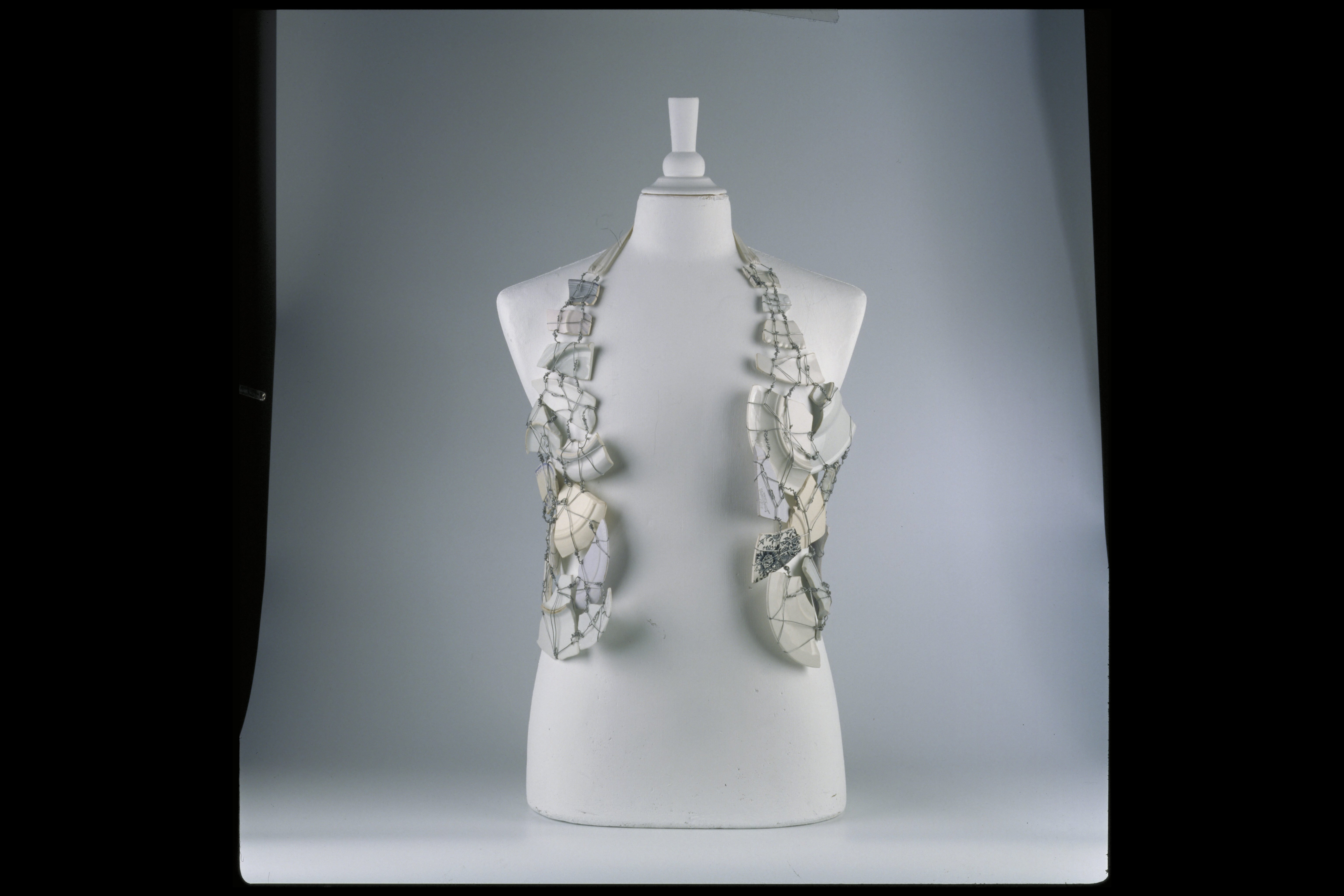 Gilet en porcelaine, Martin Margiela